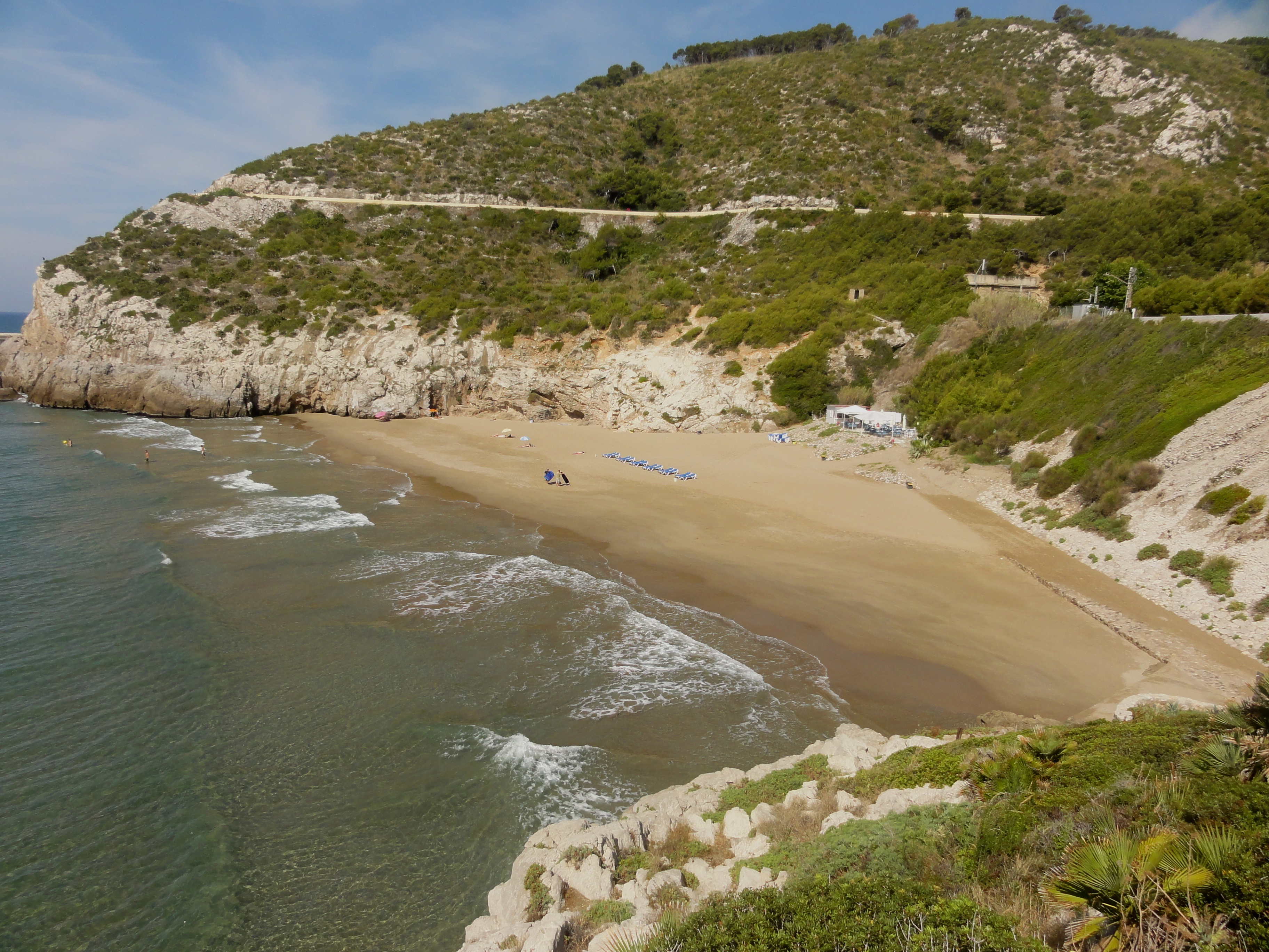 Cala Morisca (Sitges) This is a a photo of a beach in Catalonia, Spain, with id: PL-CT-17003-288